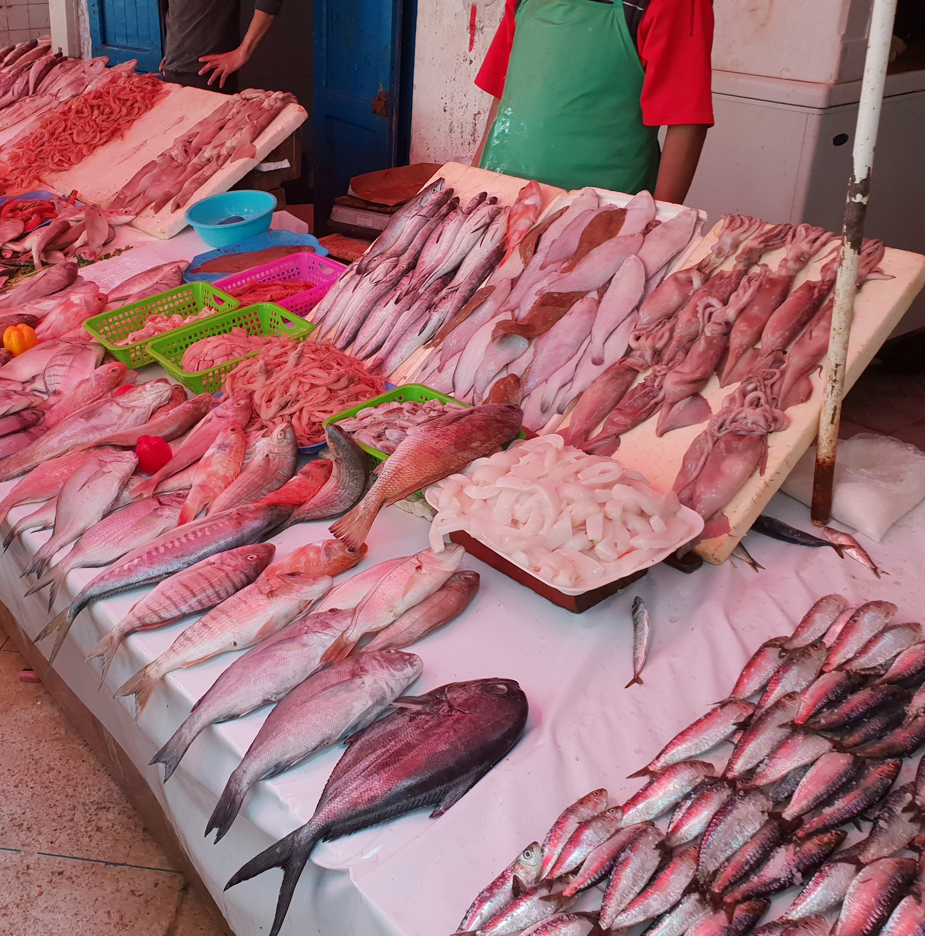 Fangfrischer Atlantikfisch auf einem Fischmarkt in Marokko